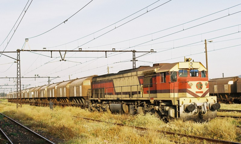 ONCF DH 367 en gare de Fès